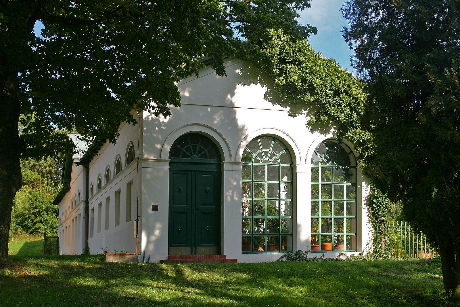 oranžerie